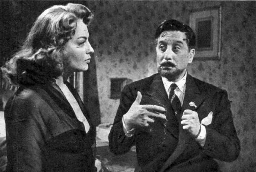 Yvonne Sanson+Giulio Stival ne "Il cappotto"(Lattuada, 1952)